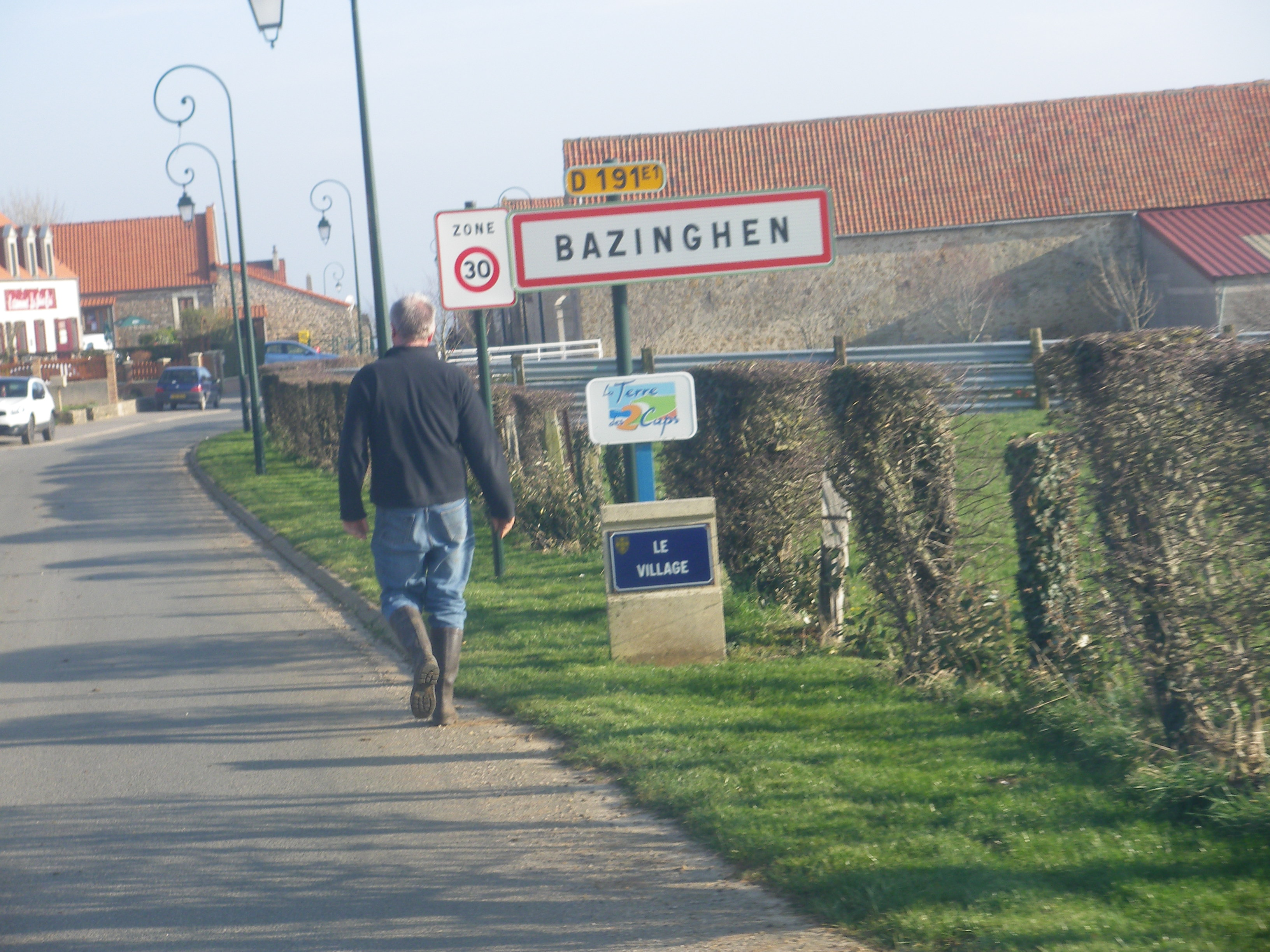 Panneau d'entrée de la commune de Bazinghen.